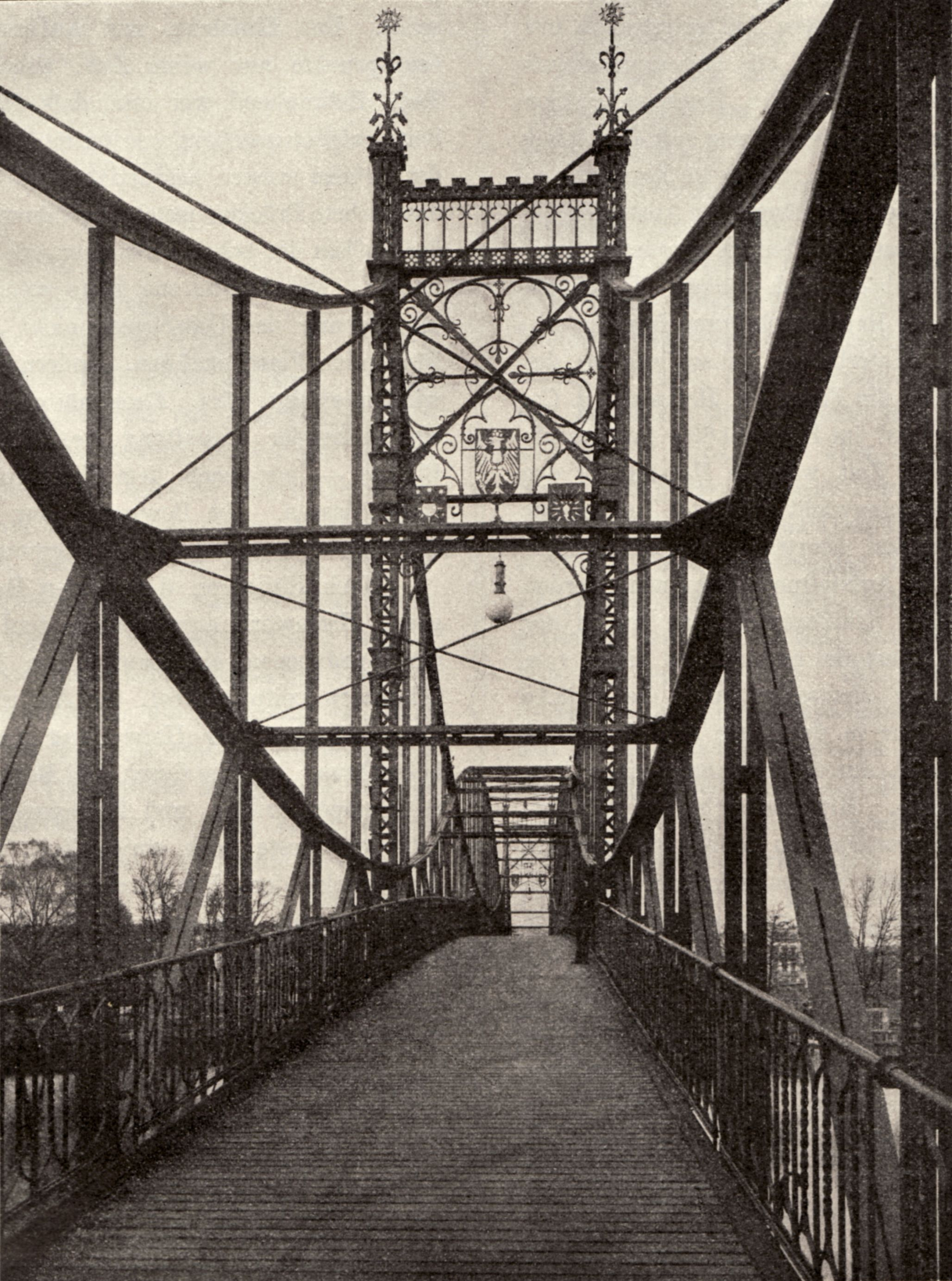 Berlin - Kaisersteg über die Spree, Oberschöneweide